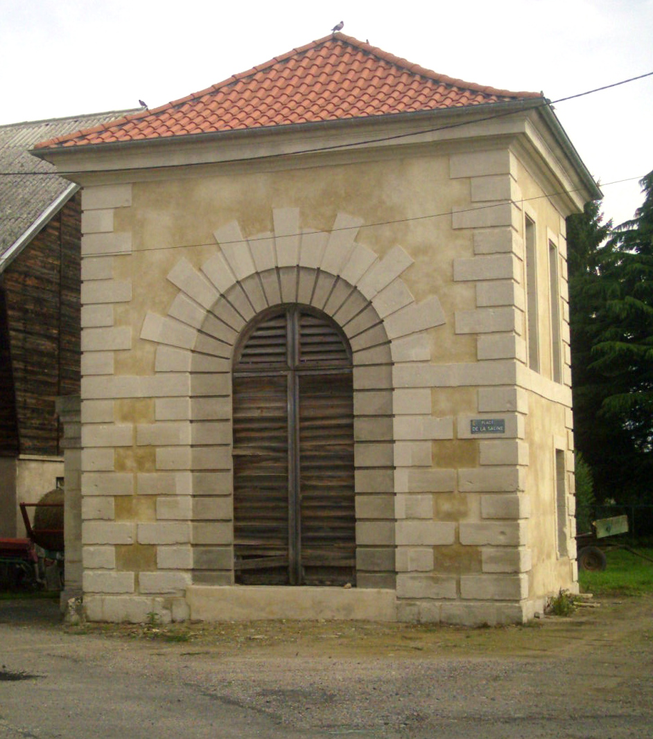 Porte d’entrée de l’ancienne saline royale de Moyenvic